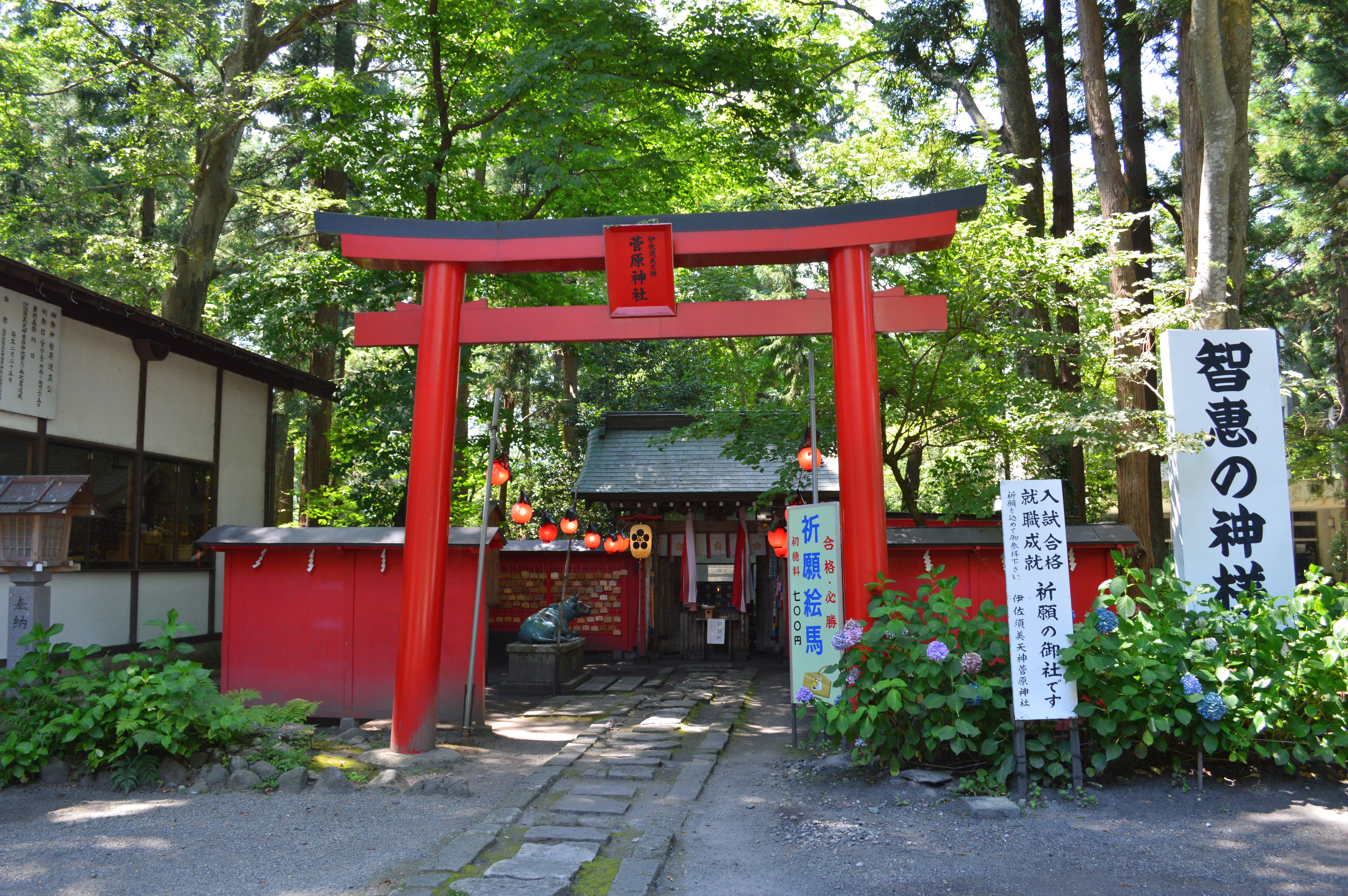 伊佐須美神社 境内菅原神社